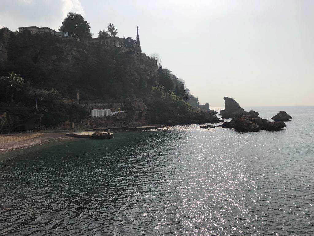 شاطئ انطاليا